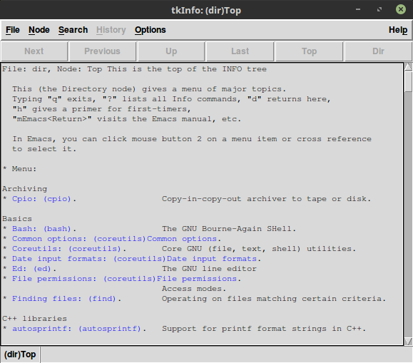 Bildschirmfoto des Programms TkInfo, einer grafischen Bedienoberfläche, eines Wrappers für das Linux-tool info.